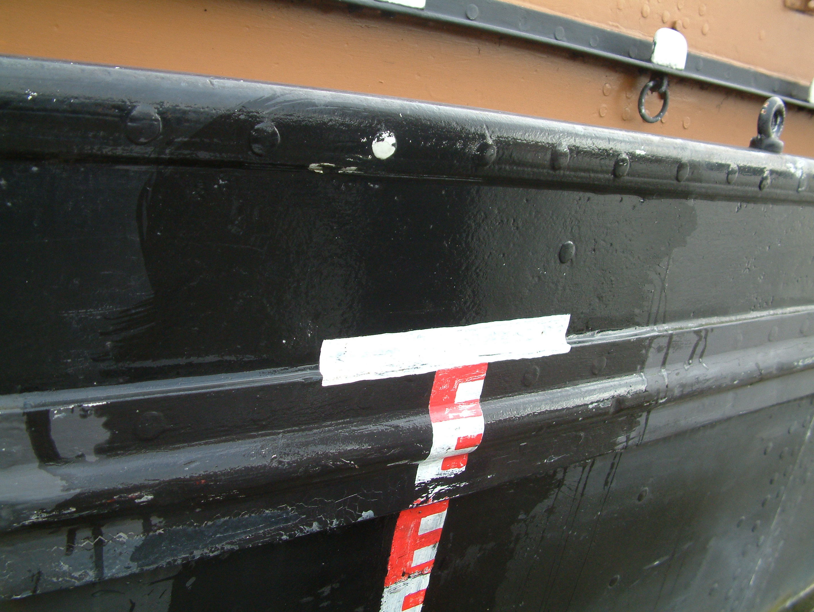 Inzinkingsmerk van een binnenschip Categorie:Binnenvaart